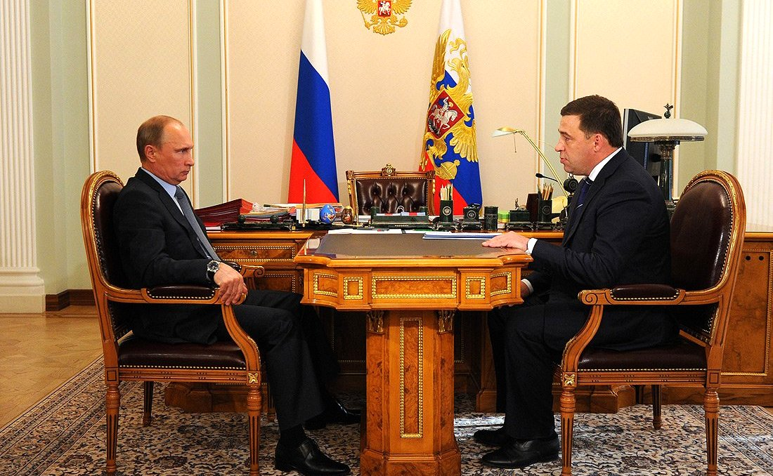 Рабочая встреча Президента России Владимира Путина с губернатором Свердловской области Евгением Куйвашевым